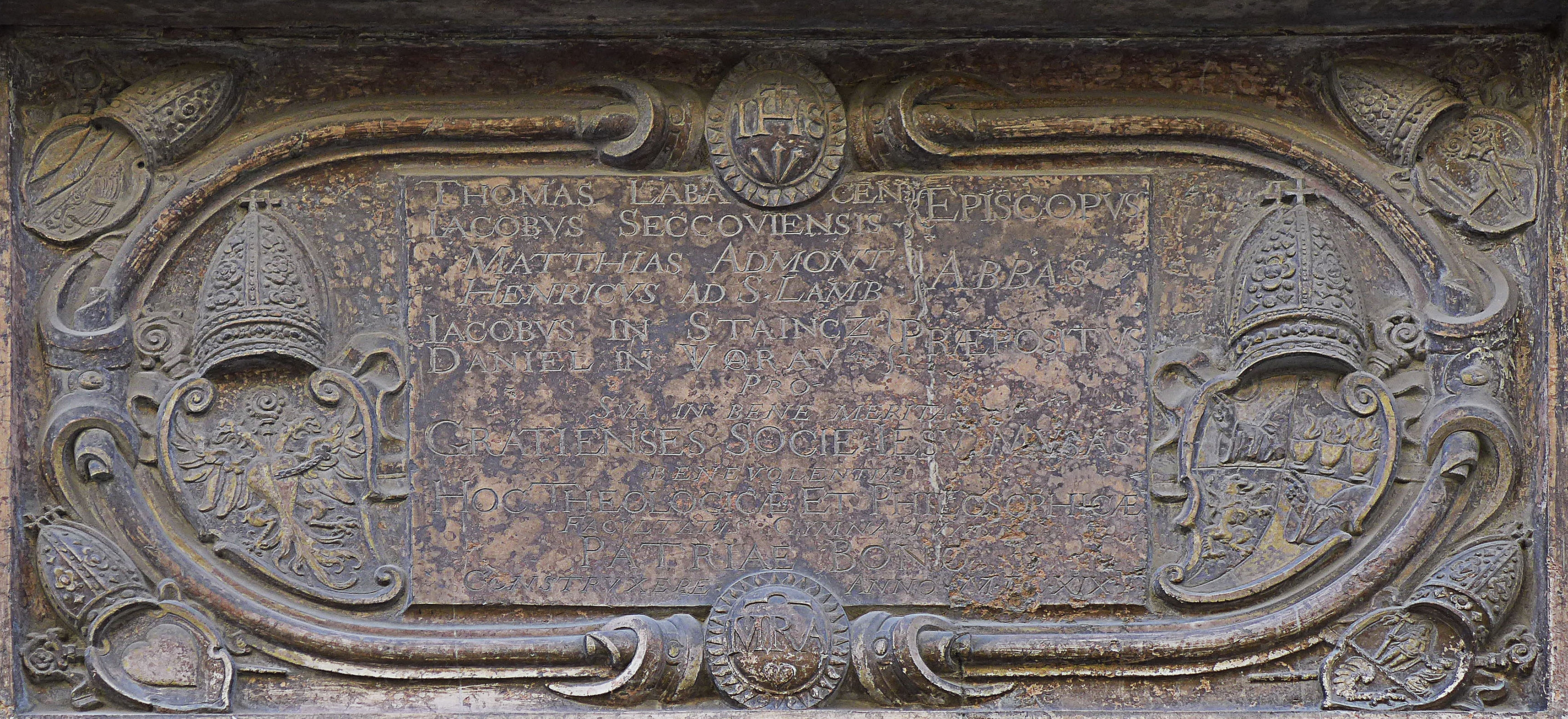 Bau-Inschrift Taubenkobel, Graz